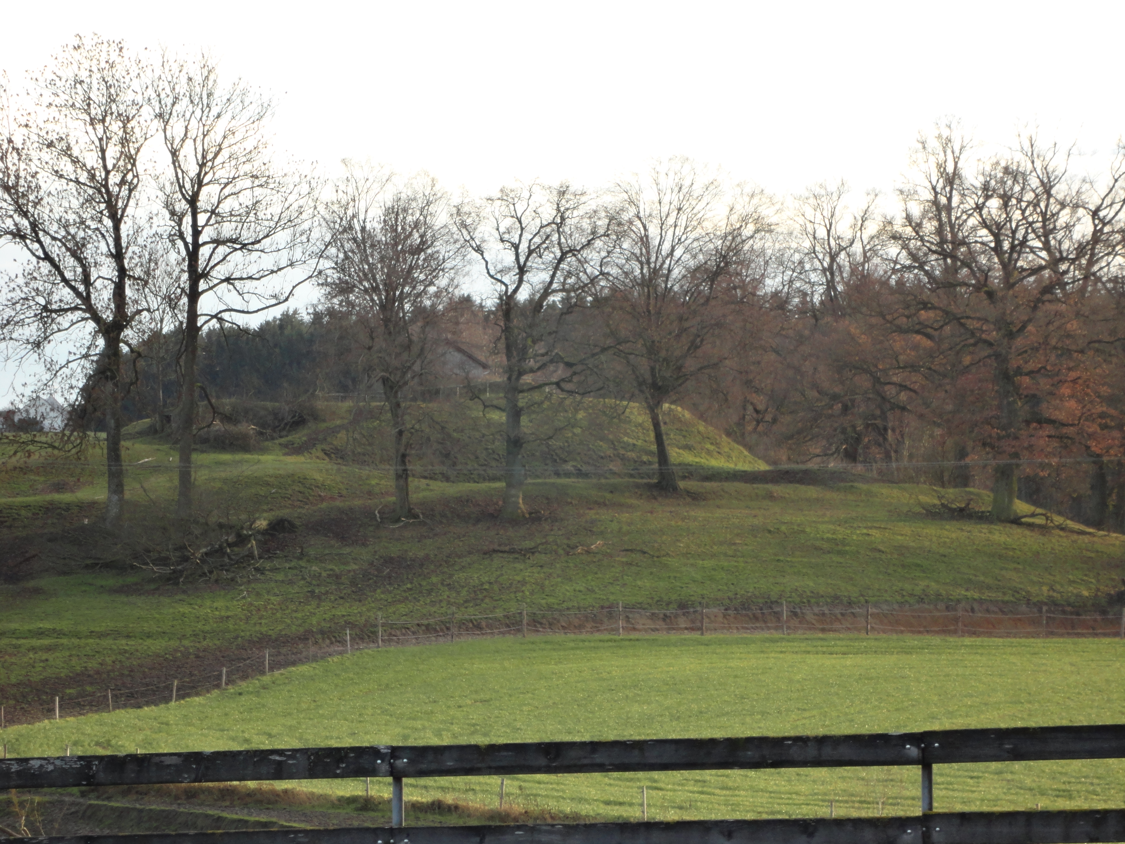 Der Burgberg vom Hofbauern aus fotografiert (Blickrichtung ca. Nord nach Süd)